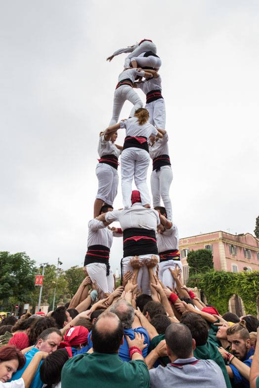 Primer 3d6 descarregat dels castellers de Viladecans a Gavà.